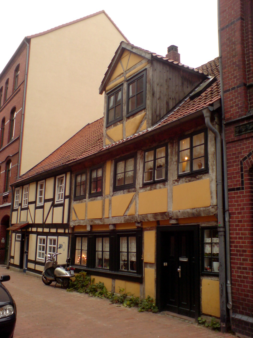 Die denkmalgeschützten Fachwerkbauten Weberstraße 20 und 21 sind die ältesten erhaltenen Wohngebäude in Linden. Die ursprünglich eingeschossigen Gebäude dienten den als Webern angeworbenen zur Unterkunft.